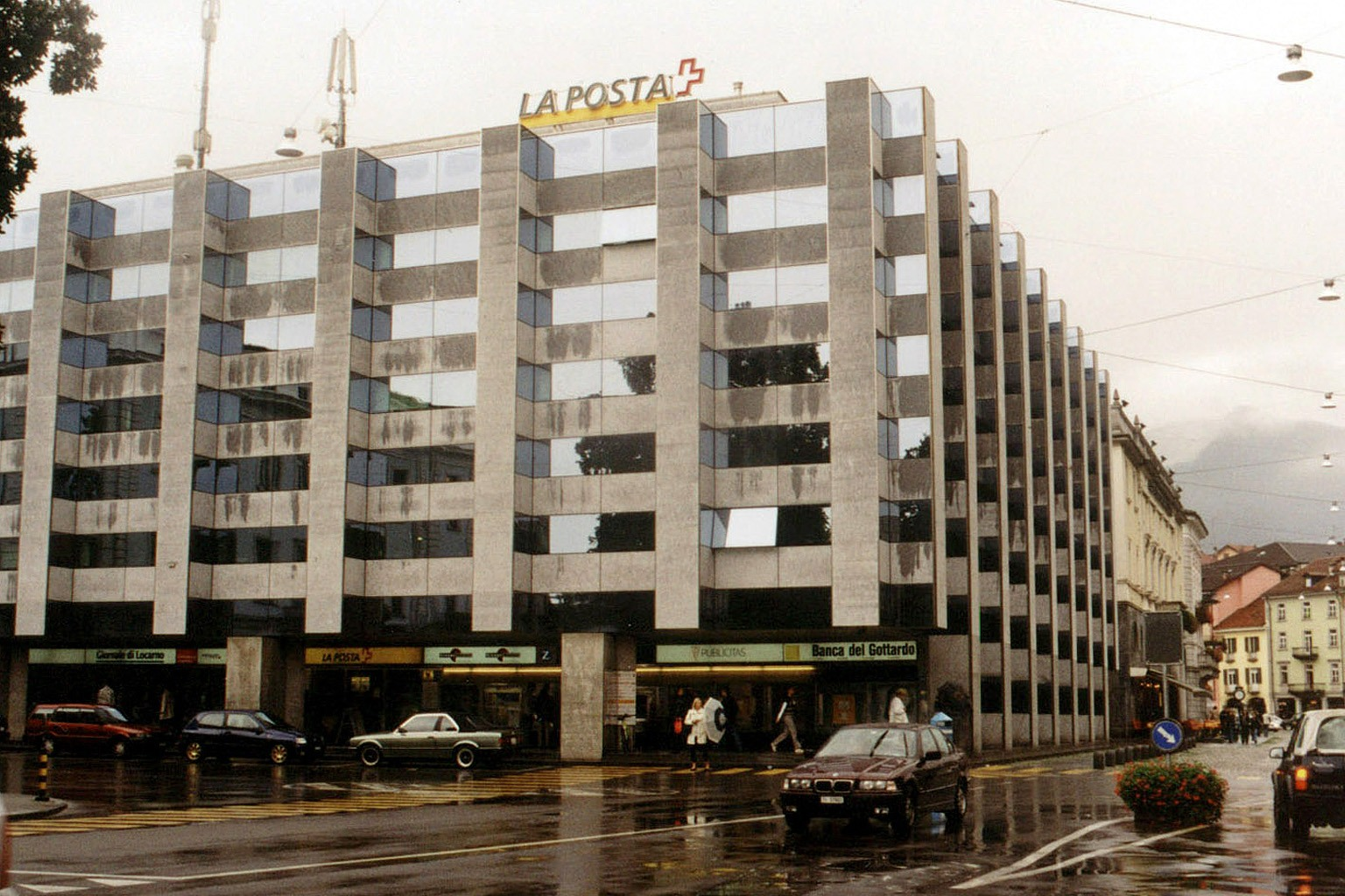 Locarno, La Posta 1990-1995 (competition 1988)